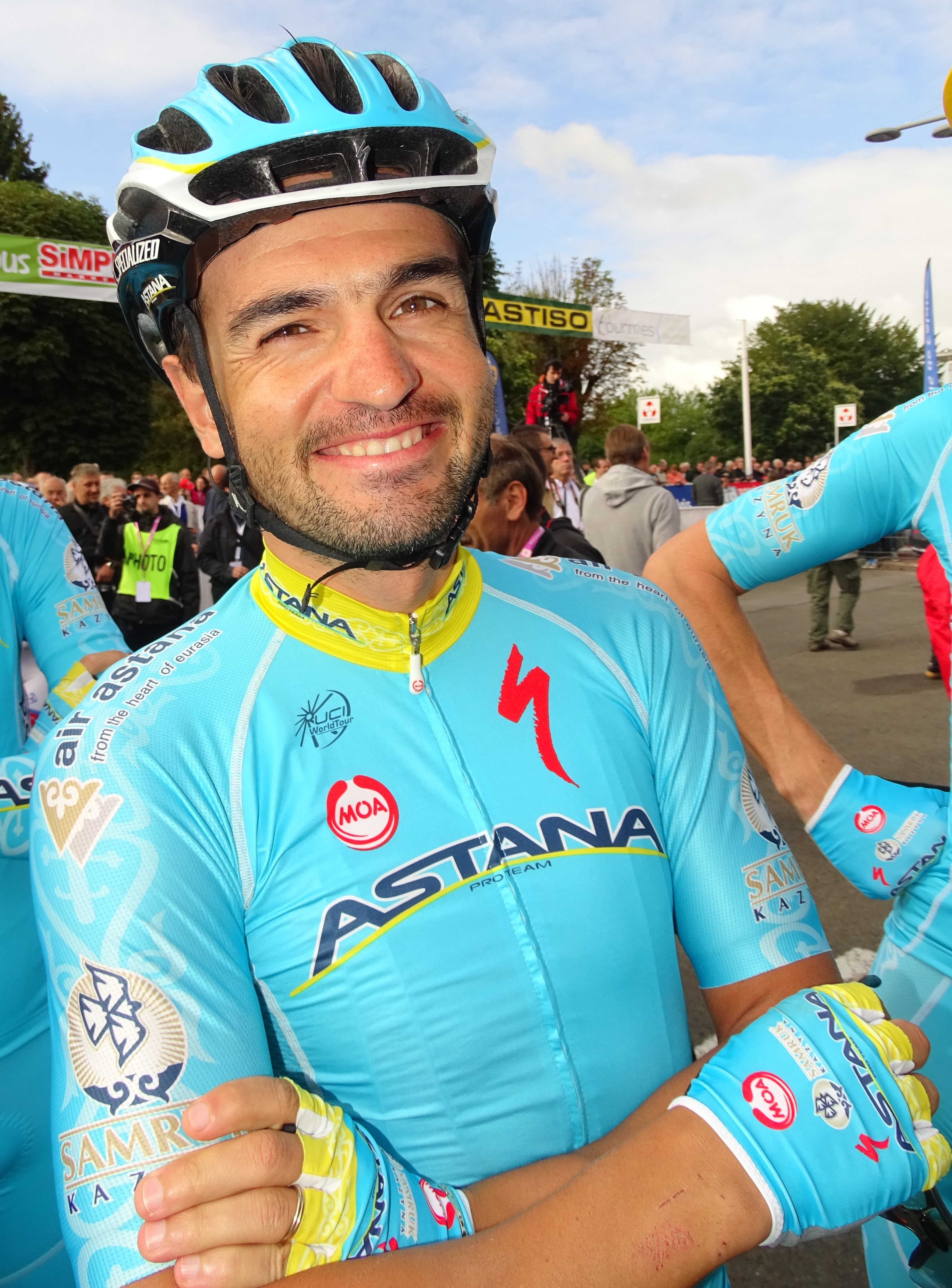 Reportage réalisé le dimanche 6 septembre à l'occasion du départ et de l'arrivée du Grand Prix de Fourmies 2015 à Fourmies, Nord-Pas-de-Calais, France.